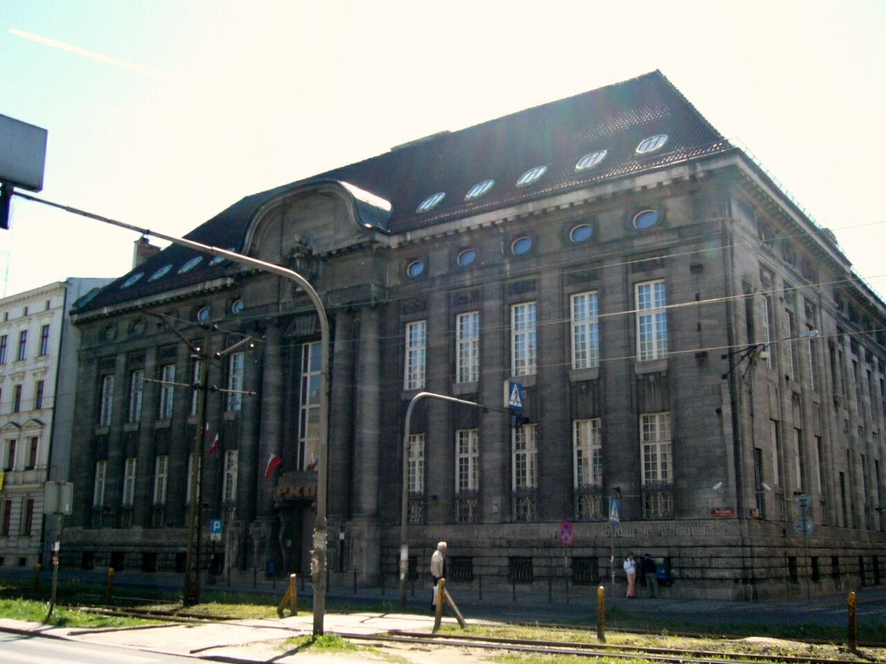 Kościuszki 15 w Łodzi, dawniej budynek Łódzkiego Banku Handlowego, obecnie PKO BP